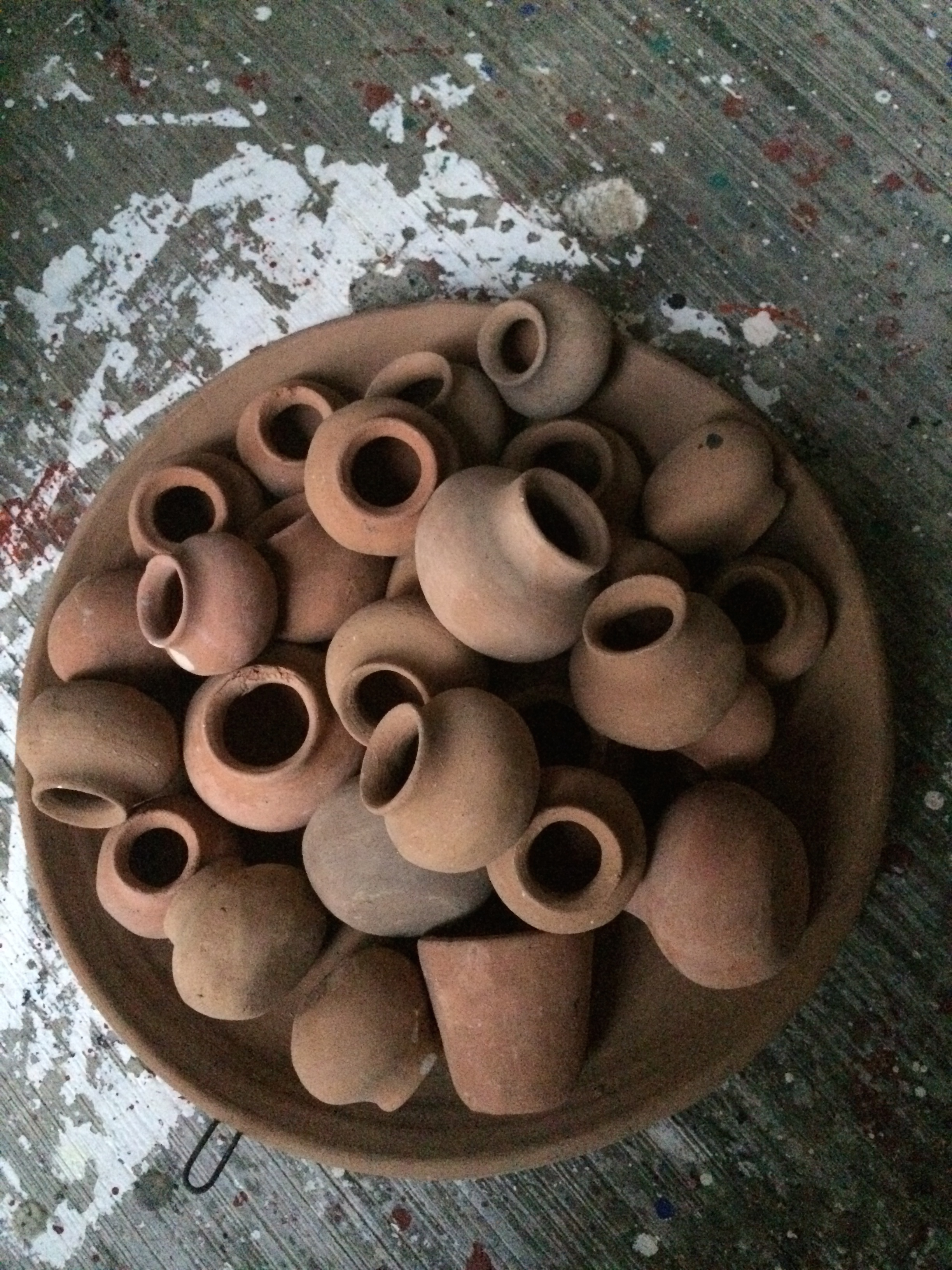 Miniaturas en Chililico, Hidalgo